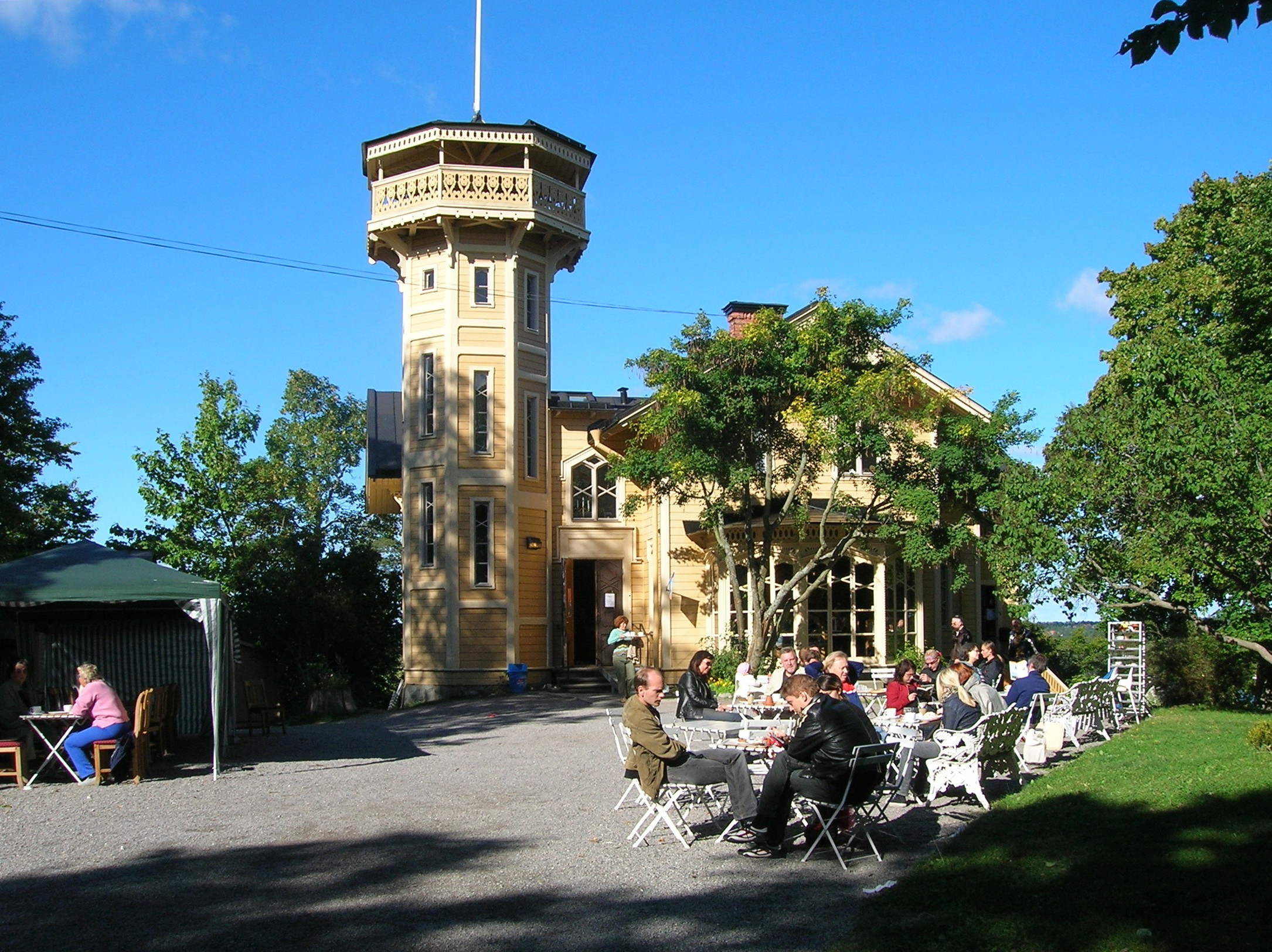 Lyran, ett sommarnöje från 1867, uppförd av Carl Limnell. Tornet har höj- och sänkbart tak. Bredäng, Stockholm